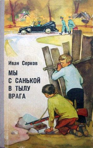 Cover of the Russian first edition of Серков, Иван Киреевич Мы с Санькой в тылу врага.